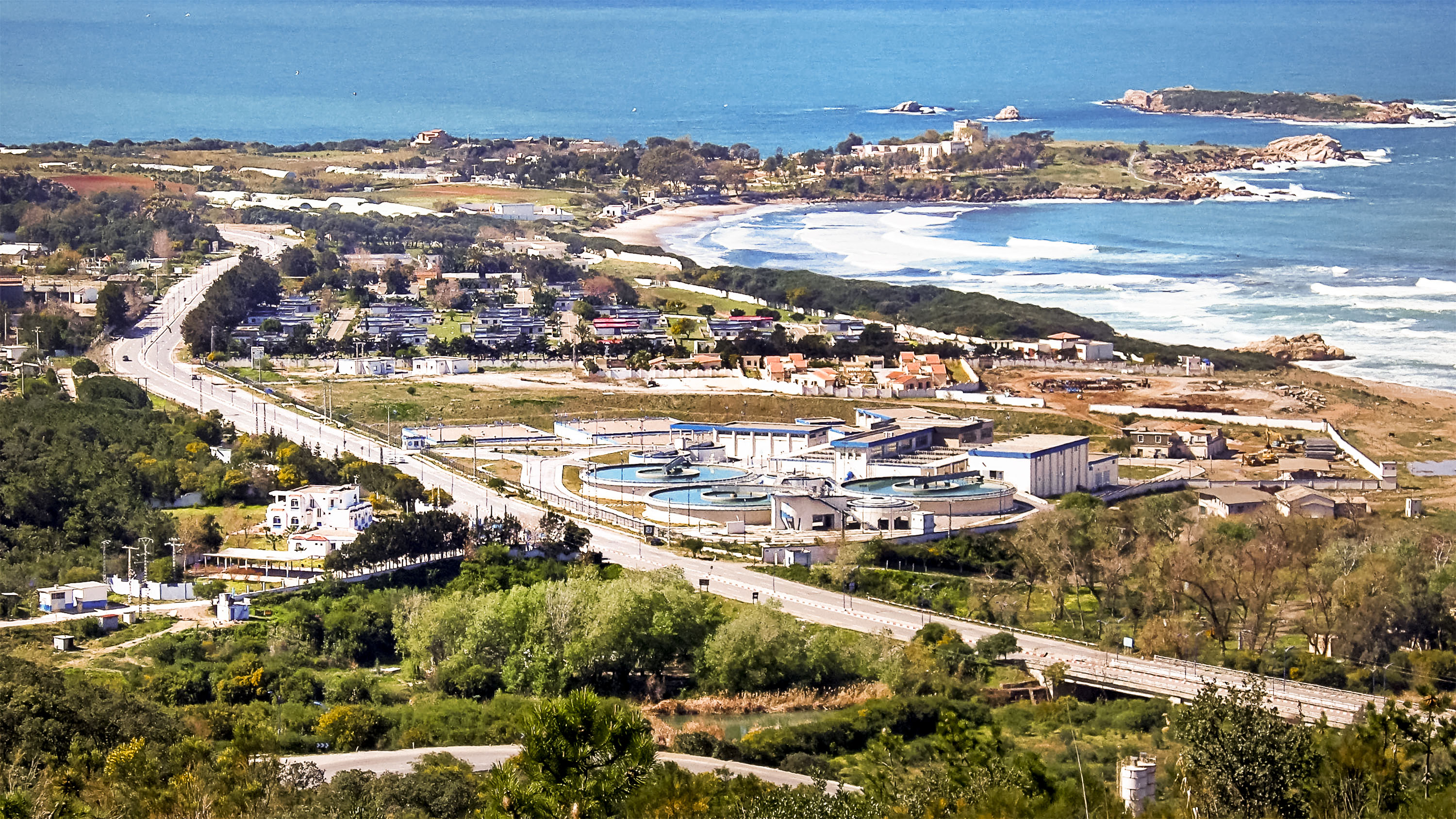 Jijel - Oued Kissir جيجل - واد كيسير Barrage de Oued Kissir, wilaya de Jijel سد واد كيسير، ولاية جيجل